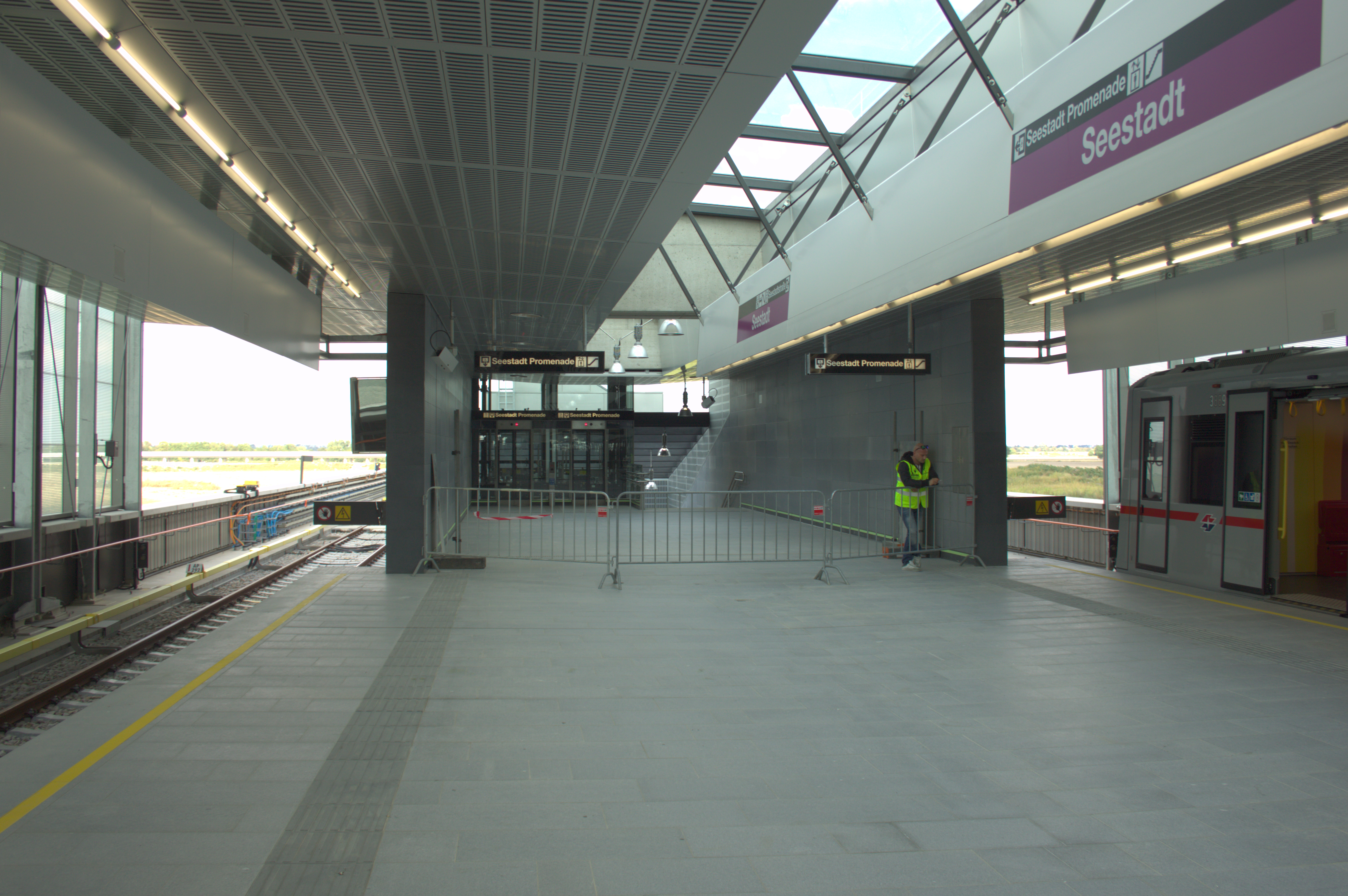 Wiener U-Bahn-Station Seestadt der Linie U2, schon vor der Eröffnung zugänglich anlässlich einer Publikumsveranstaltung.